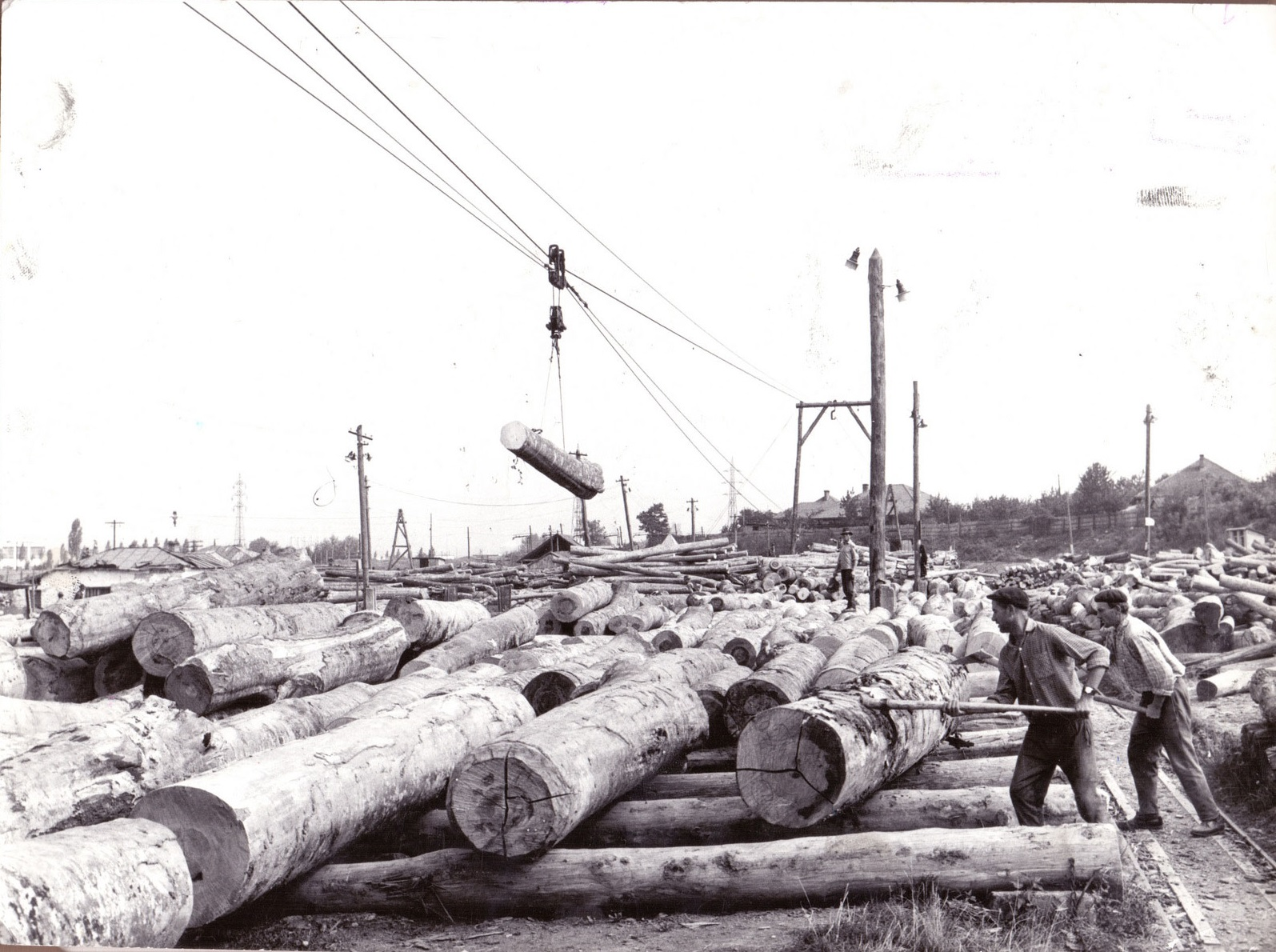 Aspect din economia forestieră a Văii Trotușului, IFET Onești. La depărtare se observă și colonia IFET.